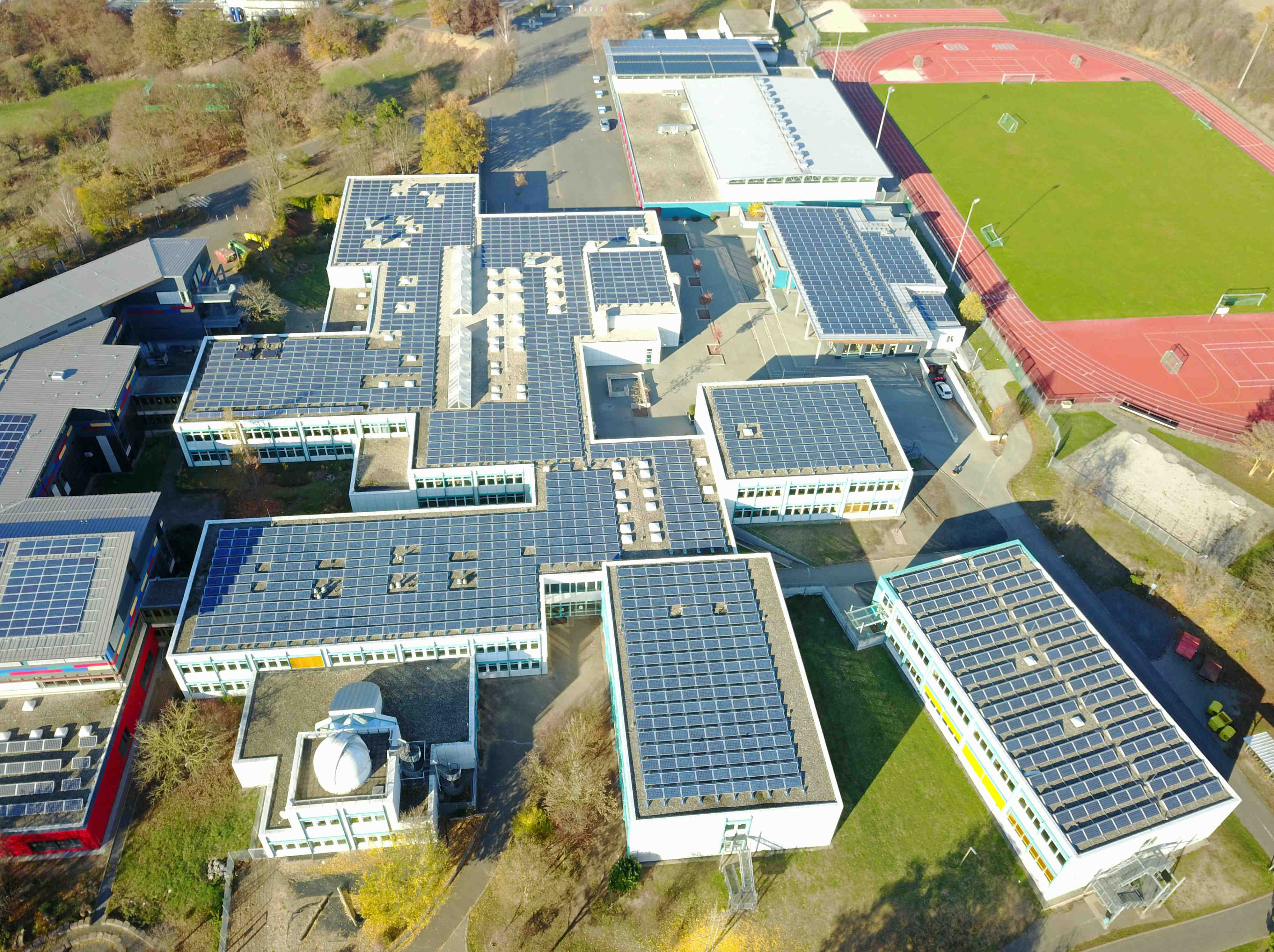 Additive Gesamtschule Freigericht